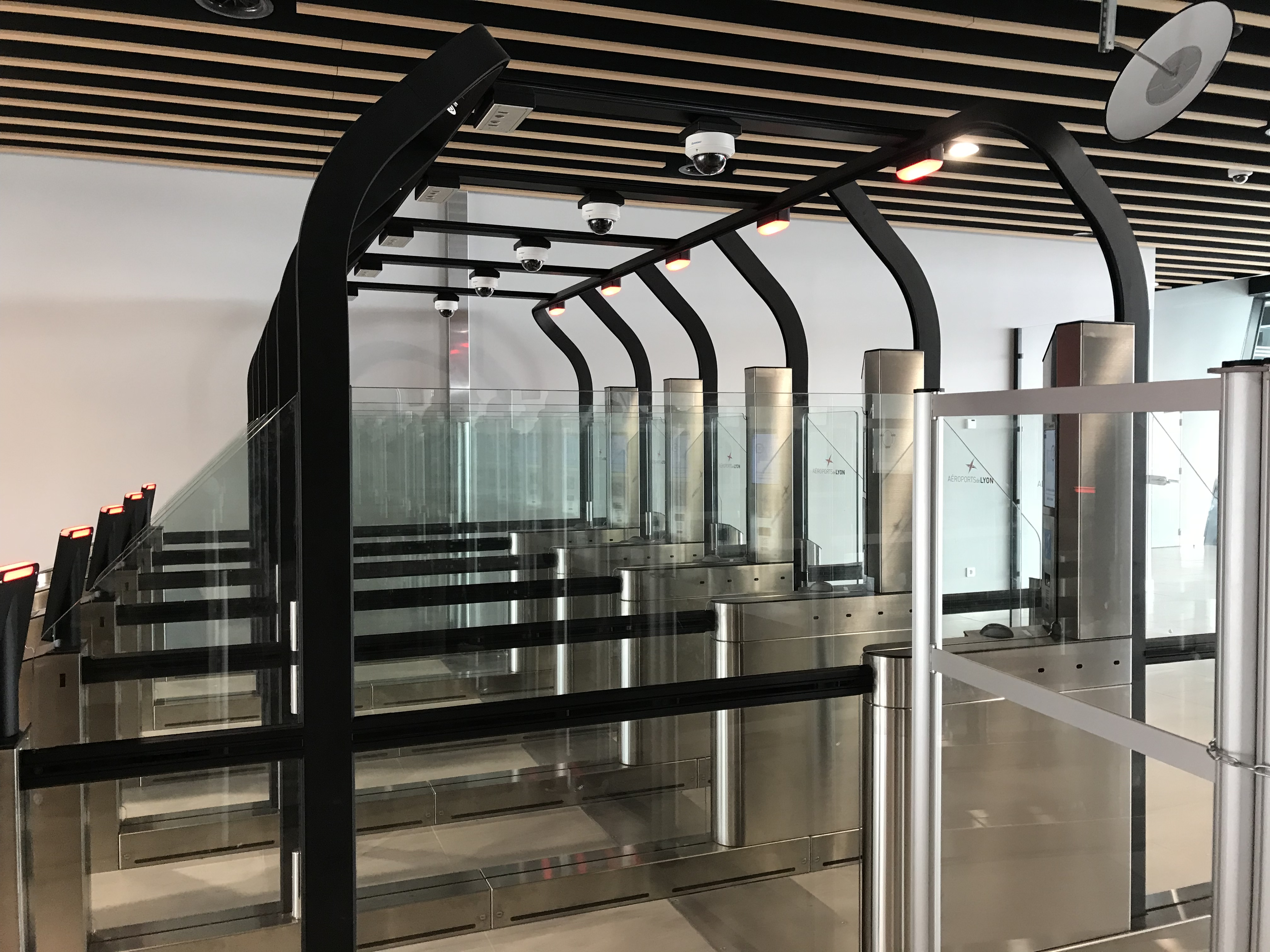 Aéroport de Lyon le 18 mars 2018.